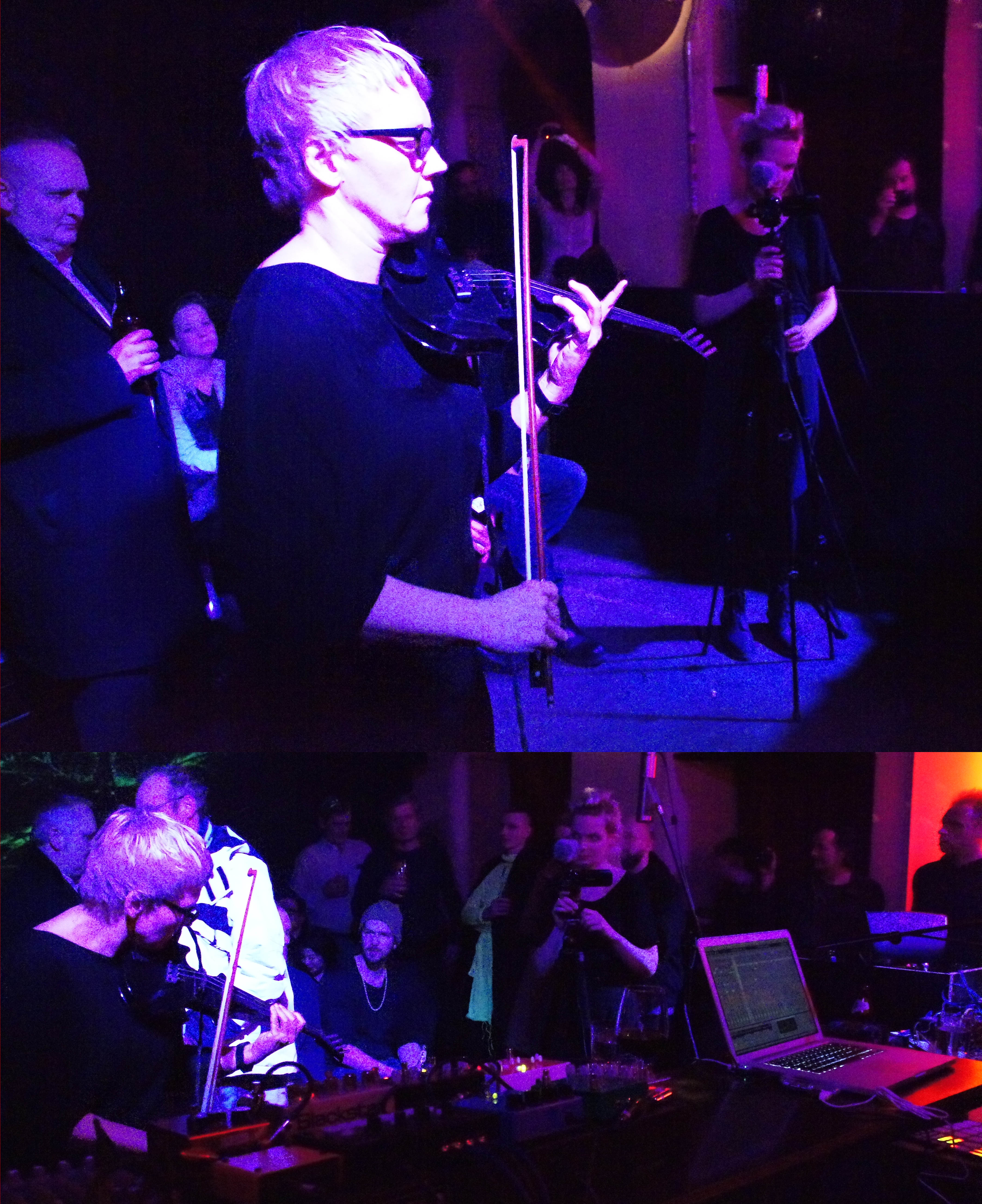 Mia Zabelka performing in Vienna's 'Elektro Gönner' club.